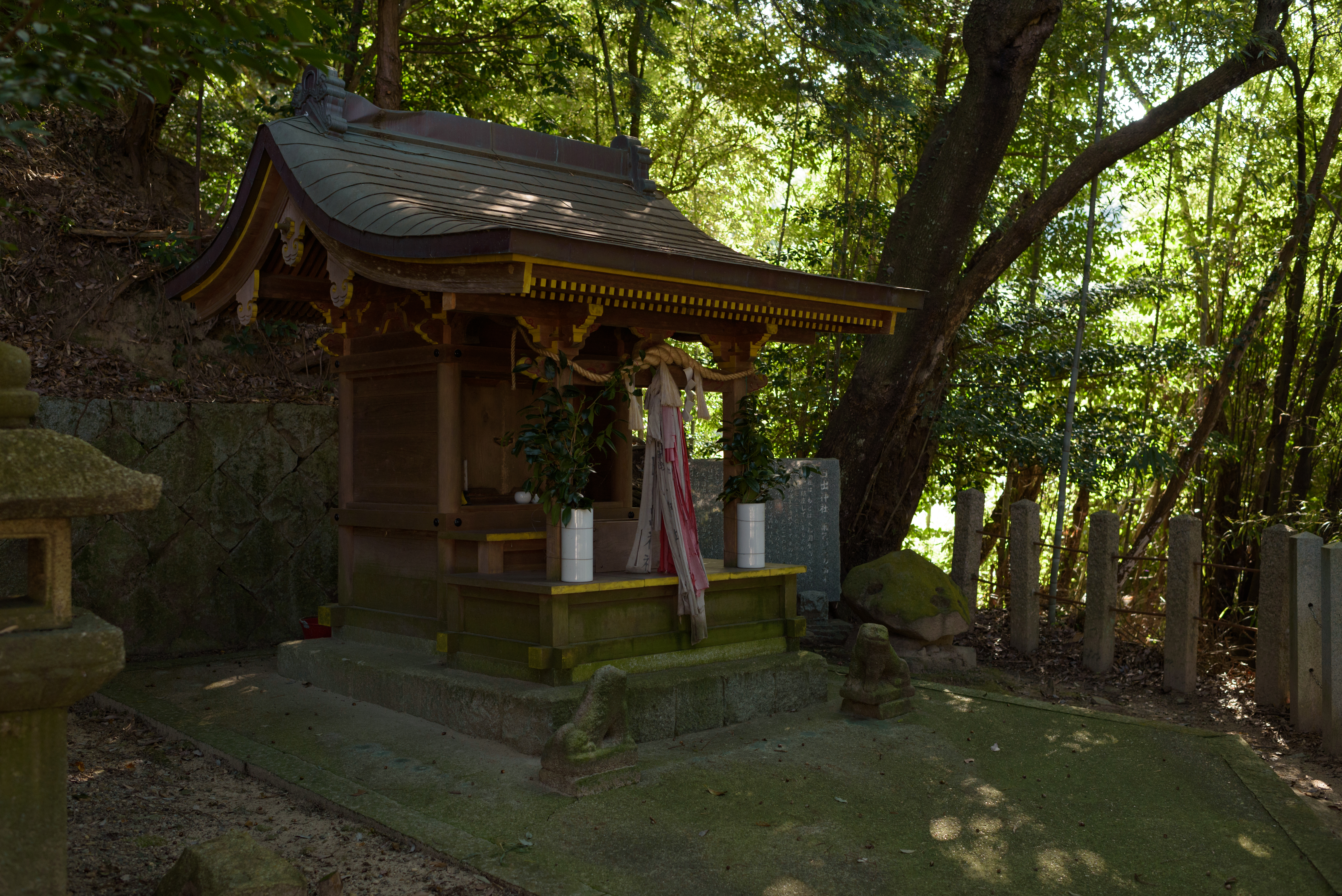 日出神社（京都府相楽郡精華町柘榴）